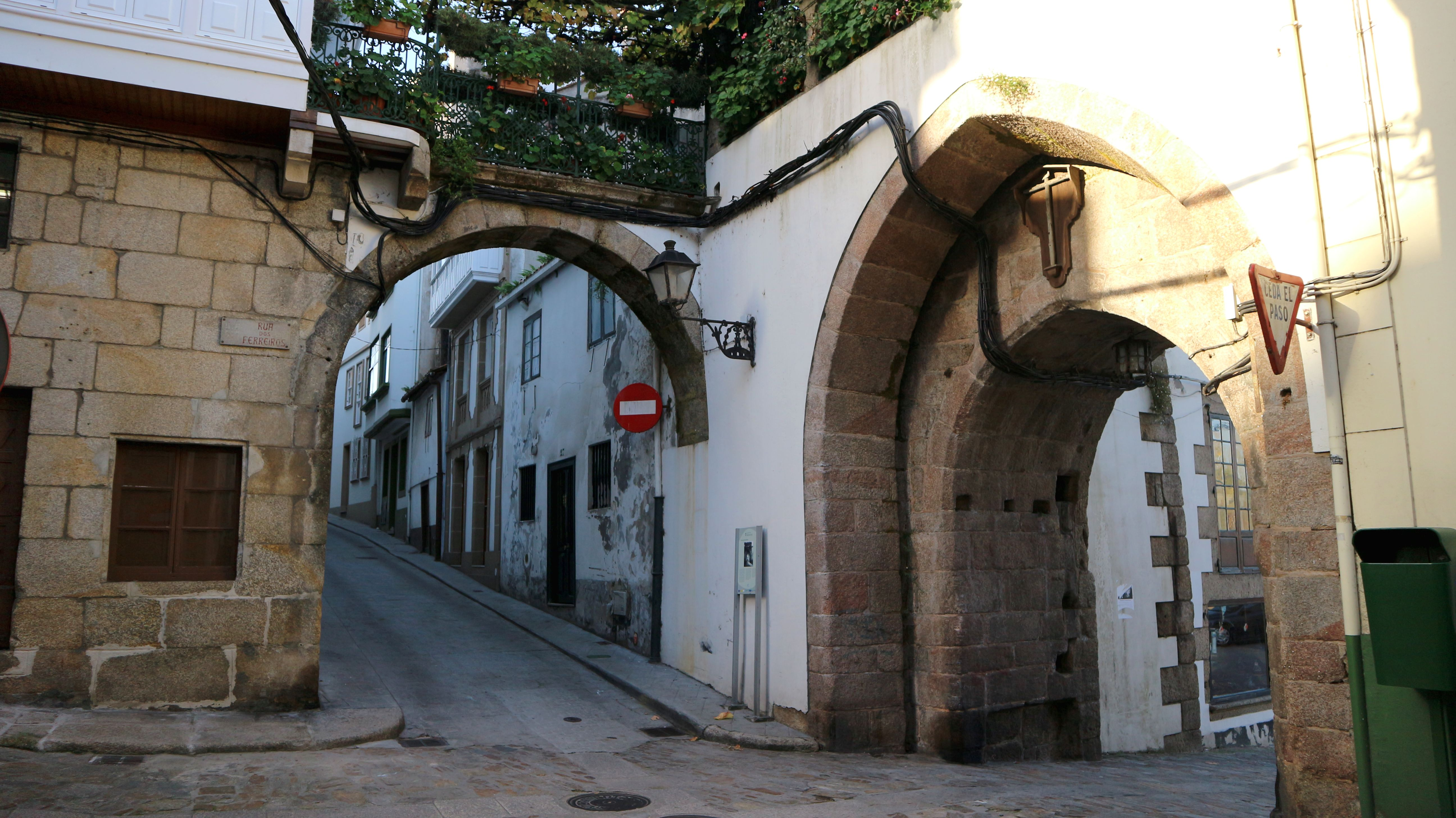 Porta da Ponte Nova de Betanzos.